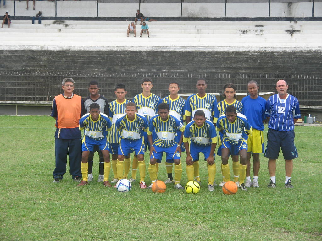 Time juvenil do Japeri Esporte Clube, em 2007. Foto de Paulo Roberto Rodrigues.